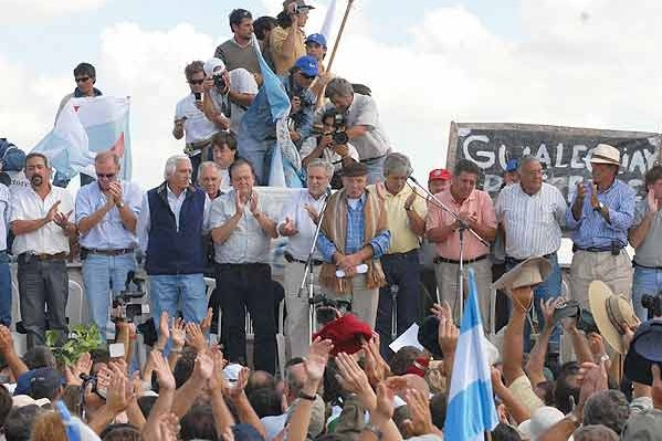 Asamblea organizada por las Sociedad Rural Argentina, CRA, CONINAGRO y FAA, en Gualeguachú (Argentina), el 2 de abril de 2008, durante el paro patronal.